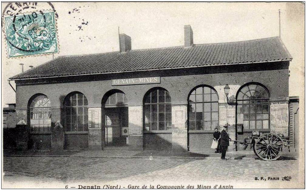 Gare de Denain-Mines en 1905 aujourd'hui disparue